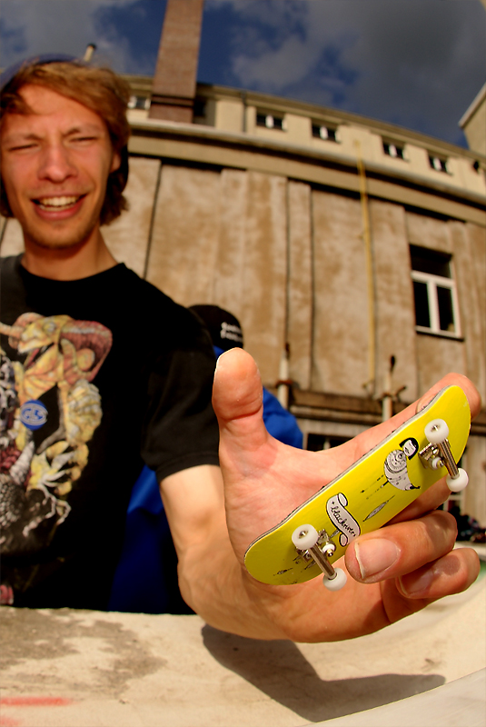 Valerij Müller, Indy Grab